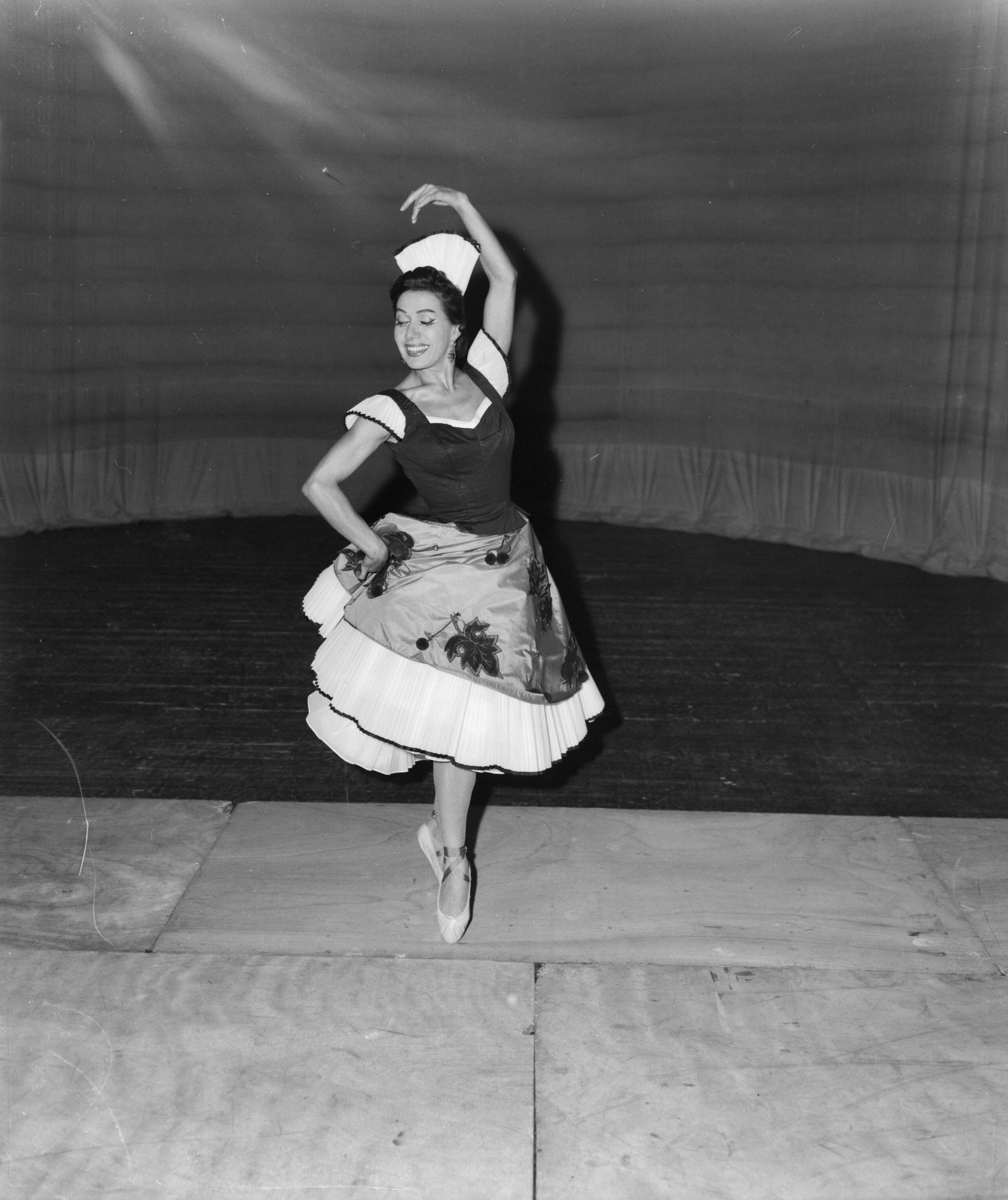 Collectie / Archief : Fotocollectie Anefo Reportage / Serie : [ onbekend ] Beschrijving : Spaanse danseres "Mariemma" in Kurhaus Scheveningen Datum : 31 juli 1958 Locatie : Scheveningen, Zuid-Holland Trefwoorden : danseressen Persoonsnaam : Scheveningen Fotograaf : Behrens, Herbert / Anefo Auteursrechthebbende : Nationaal Archief Materiaalsoort : Negatief (zwart/wit) Nummer archiefinventaris : bekijk toegang 2.24.01.04 Bestanddeelnummer : 909-7670